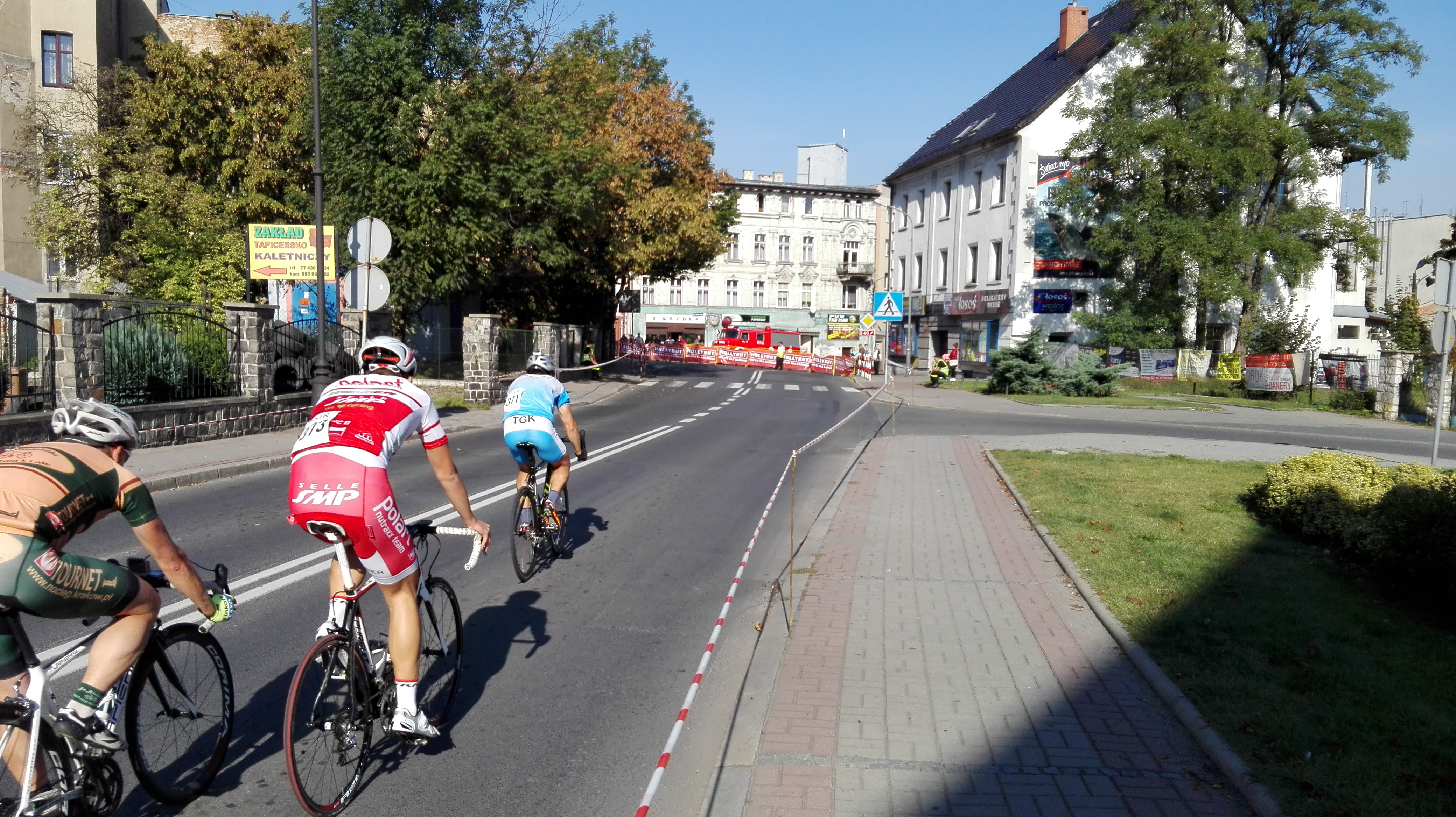 Prudnik, III Memoriał im. Stanisława Szozdy – Finał Mistrzostw Polski w kryteriach ulicznych